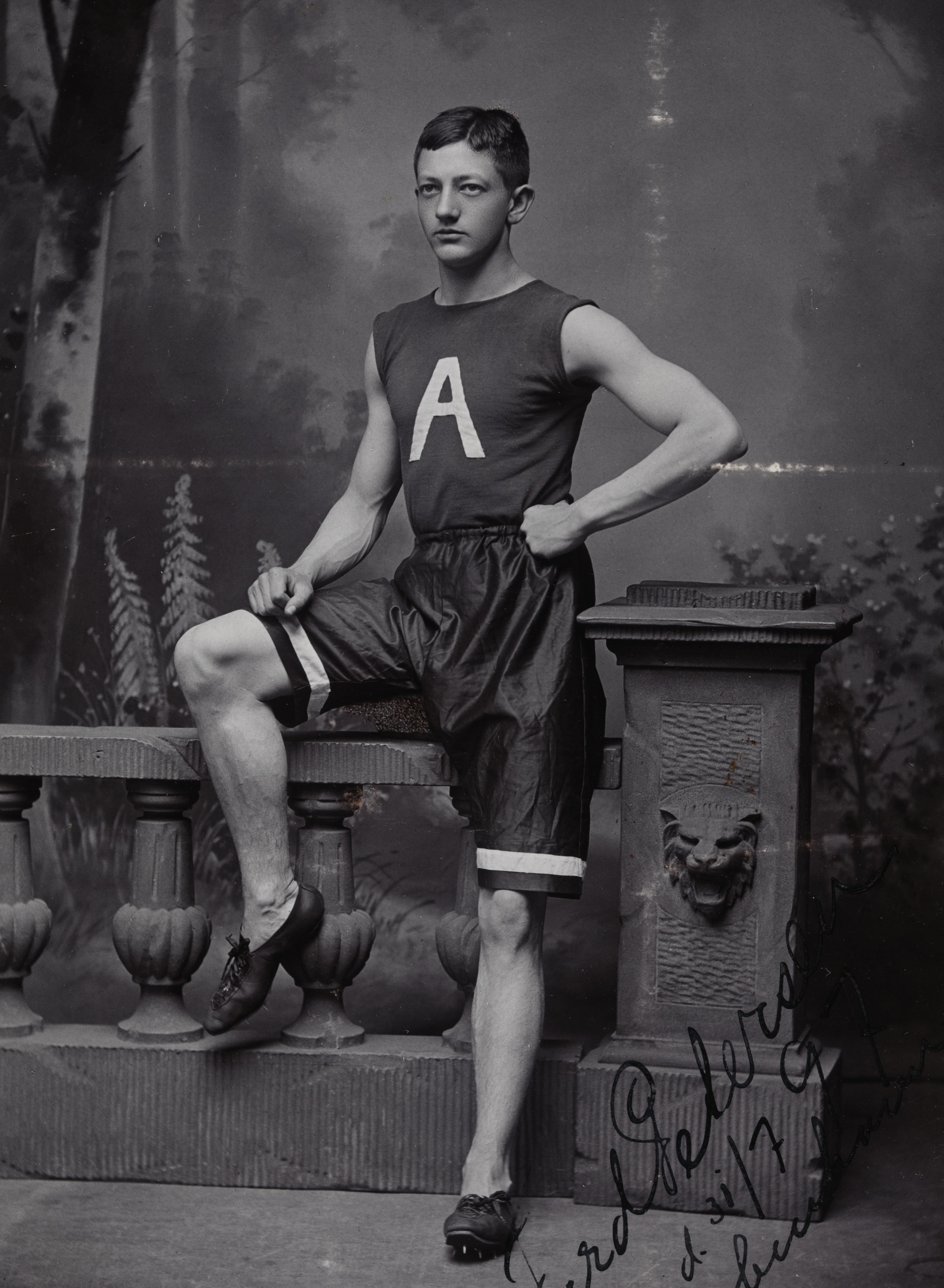 Bildet er hentet fra Nasjonalbibliotekets bildesamling. Anmerkninger til bildet var: Tittel hentet fra påskrift på komponentnr 1 Depicted person: Petersen, Ferdinand